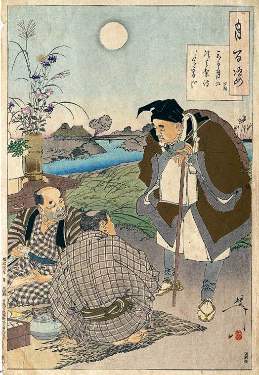 Fermier célébrant la lune d'automne